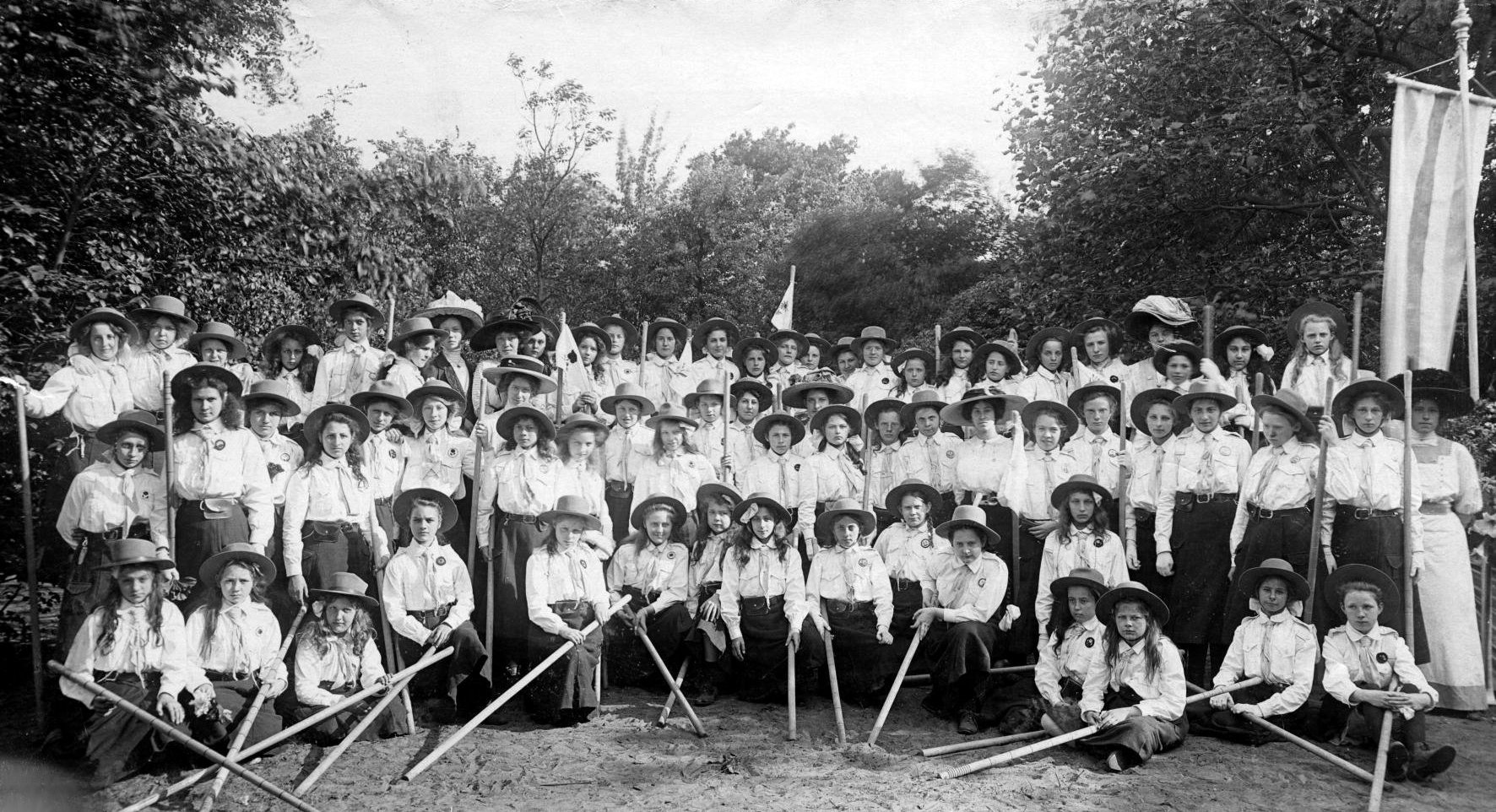 Tuinfeest van de "Meisjes Gezellen Vereniging" te Den Haag, Nederland 1911. Foto: Alle meisjes bestaande uit 8 ronden van 8 meisjes poseren voor de Presidente Mevr. Muller-van Geuns.